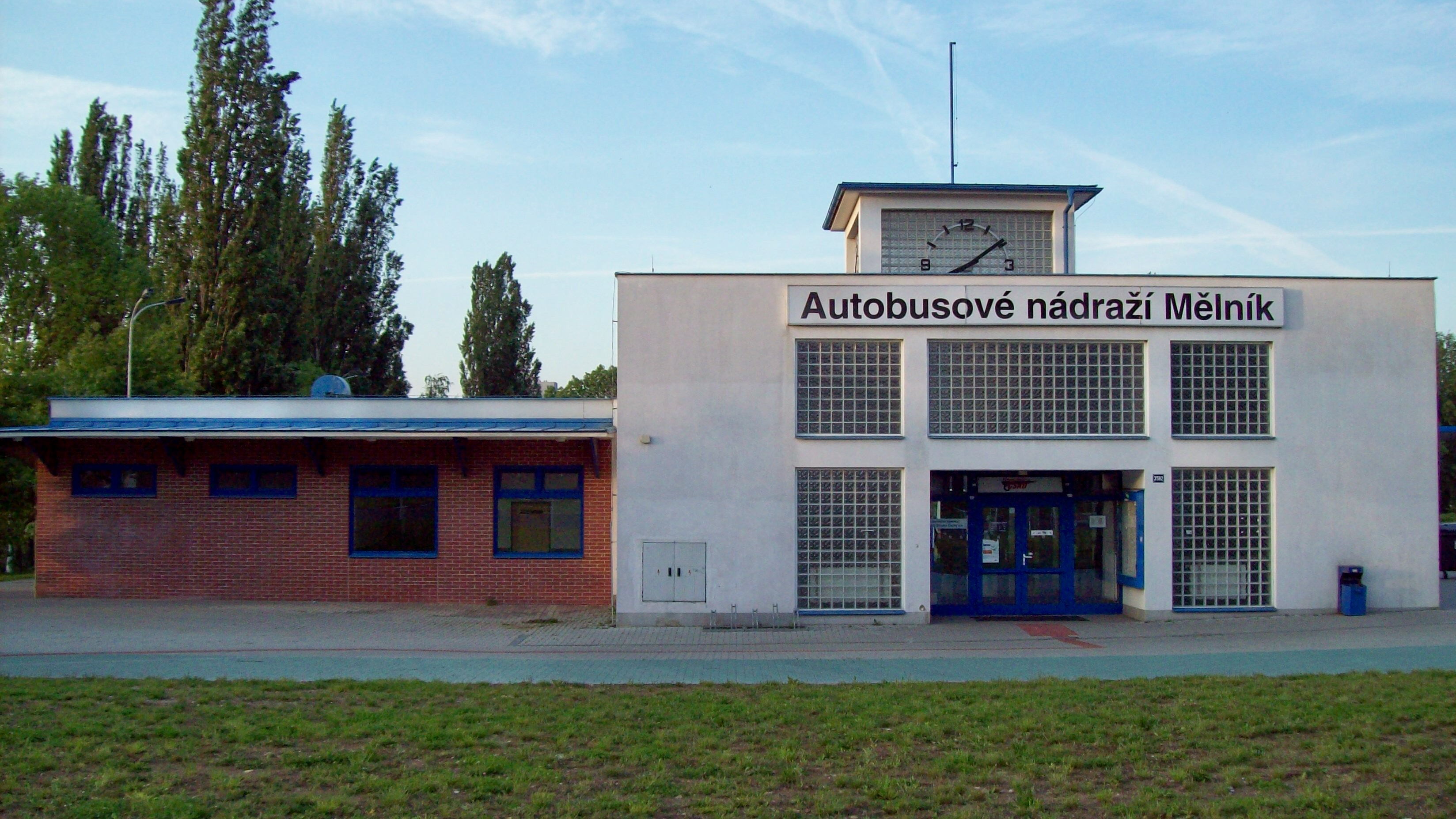 Autobusové nádraží Mělník. ul. Nádražní 2005.